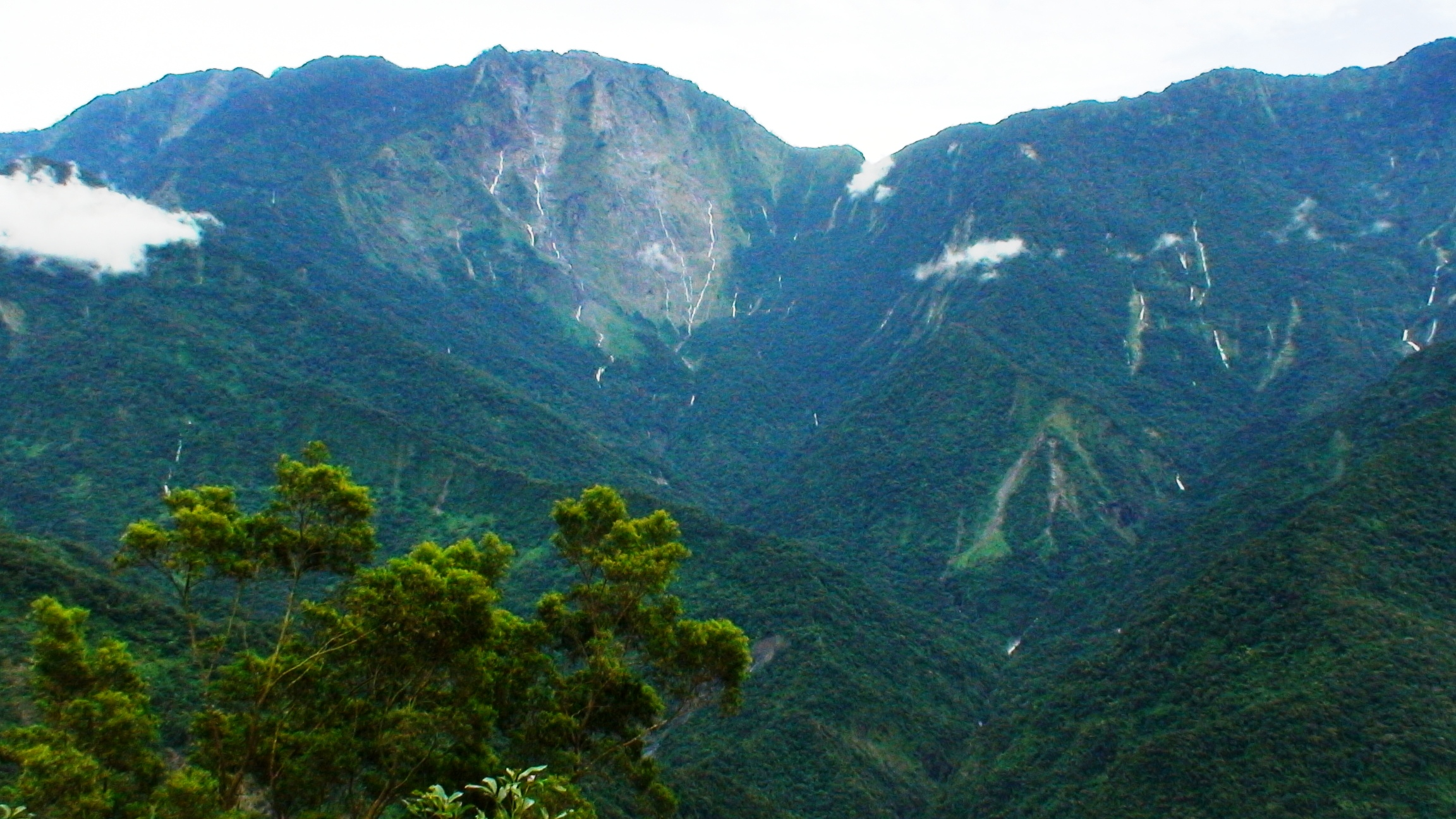 鳥瞰神秘谷陰陽瀑布